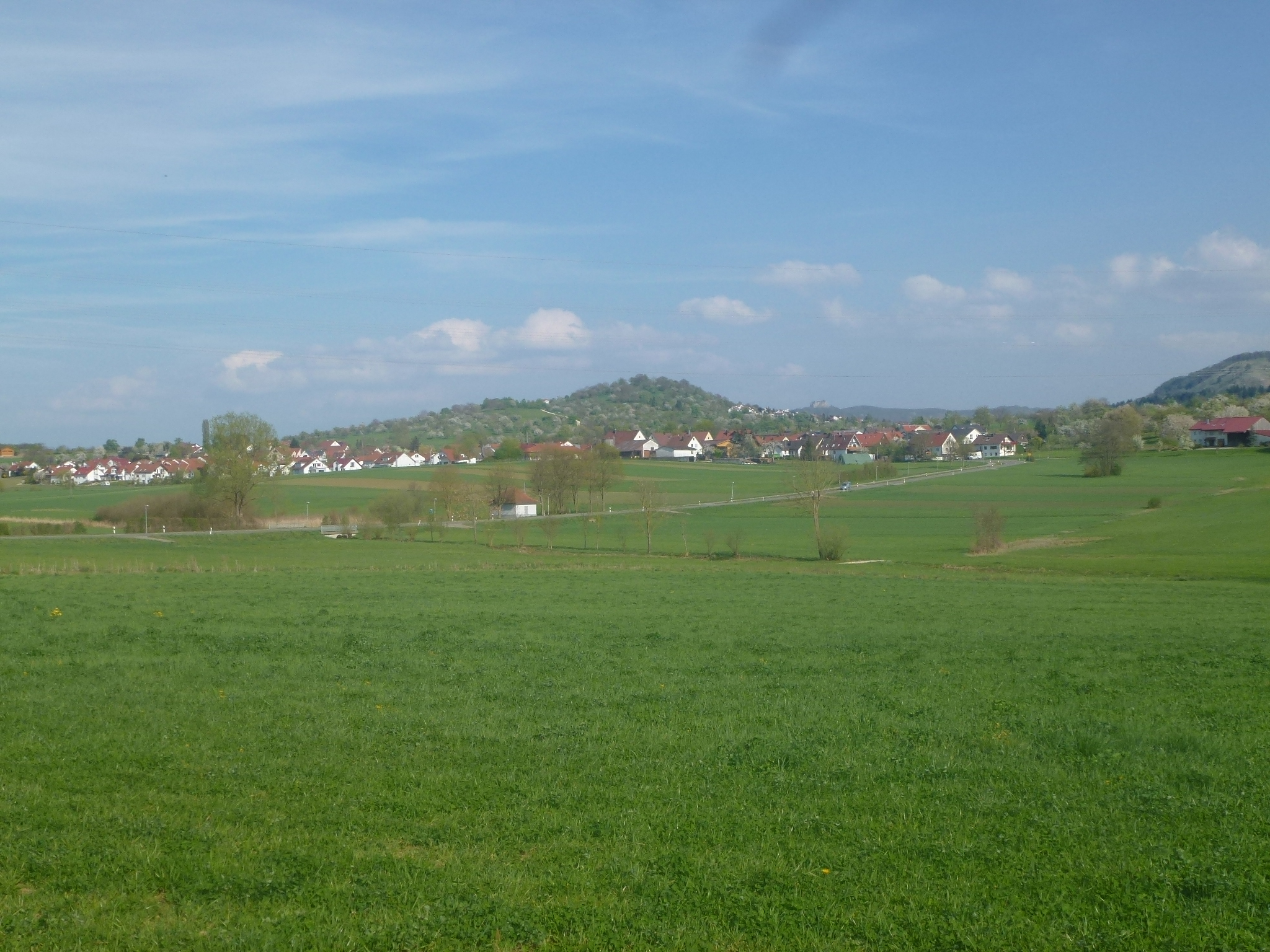 Blick von Bempflingen nach Kleinbettlingen und auf den Grafenberg (LSG 4.15.129 „Grafenberg“), Baden-Württemberg